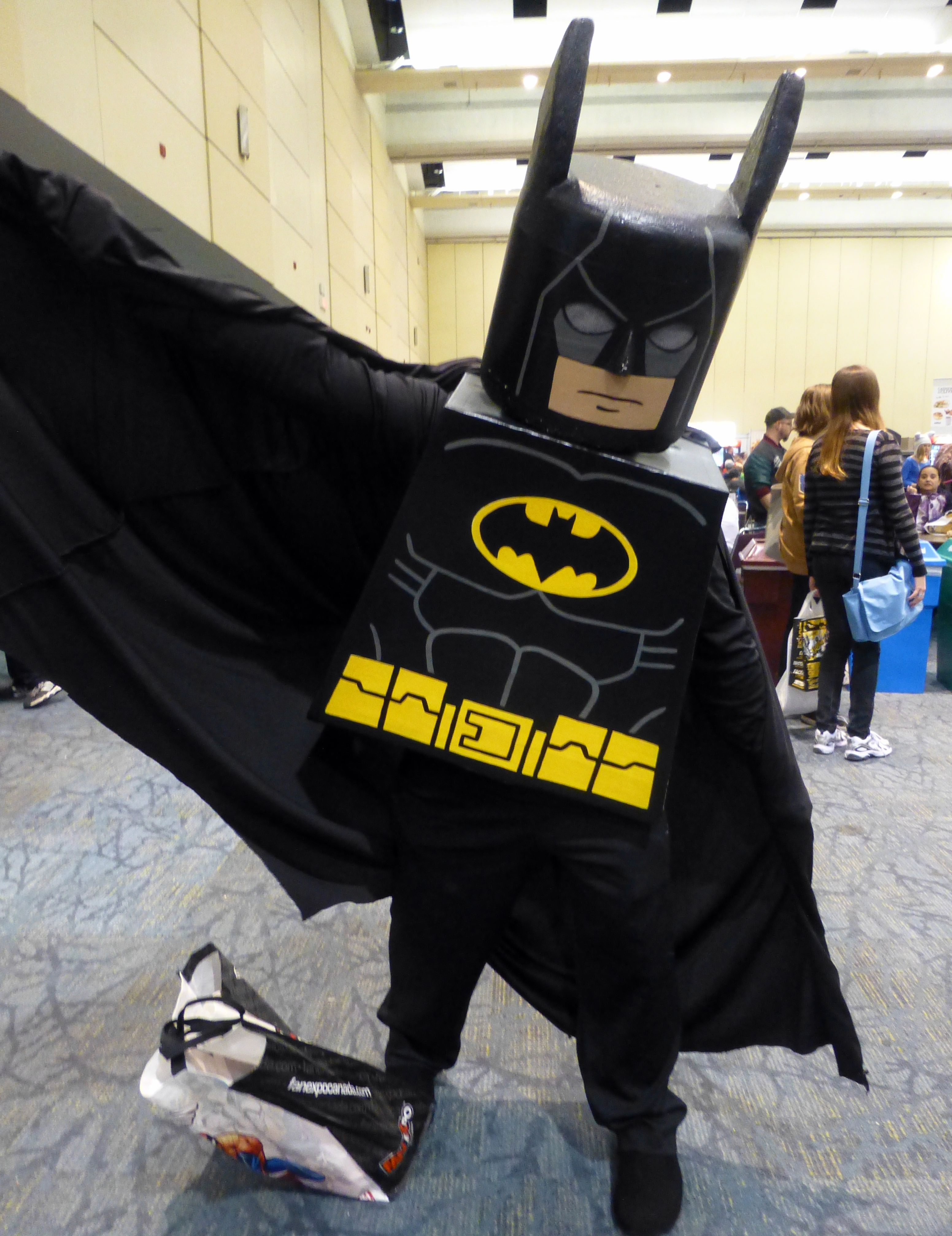 Lego Batman Toronto Comicon 2015